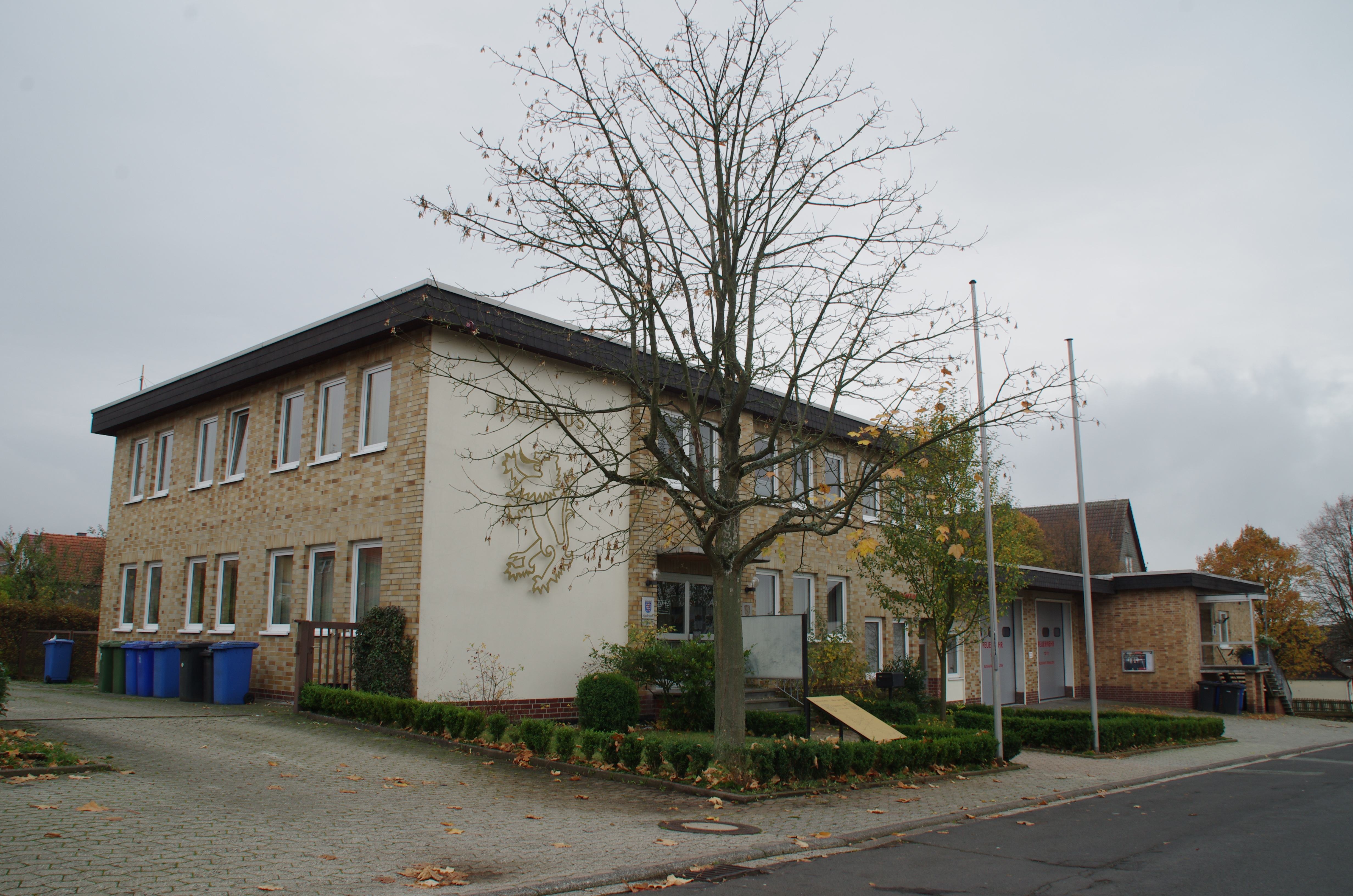 Frankenau in Hessen. Das Rathaus von Frankenau.